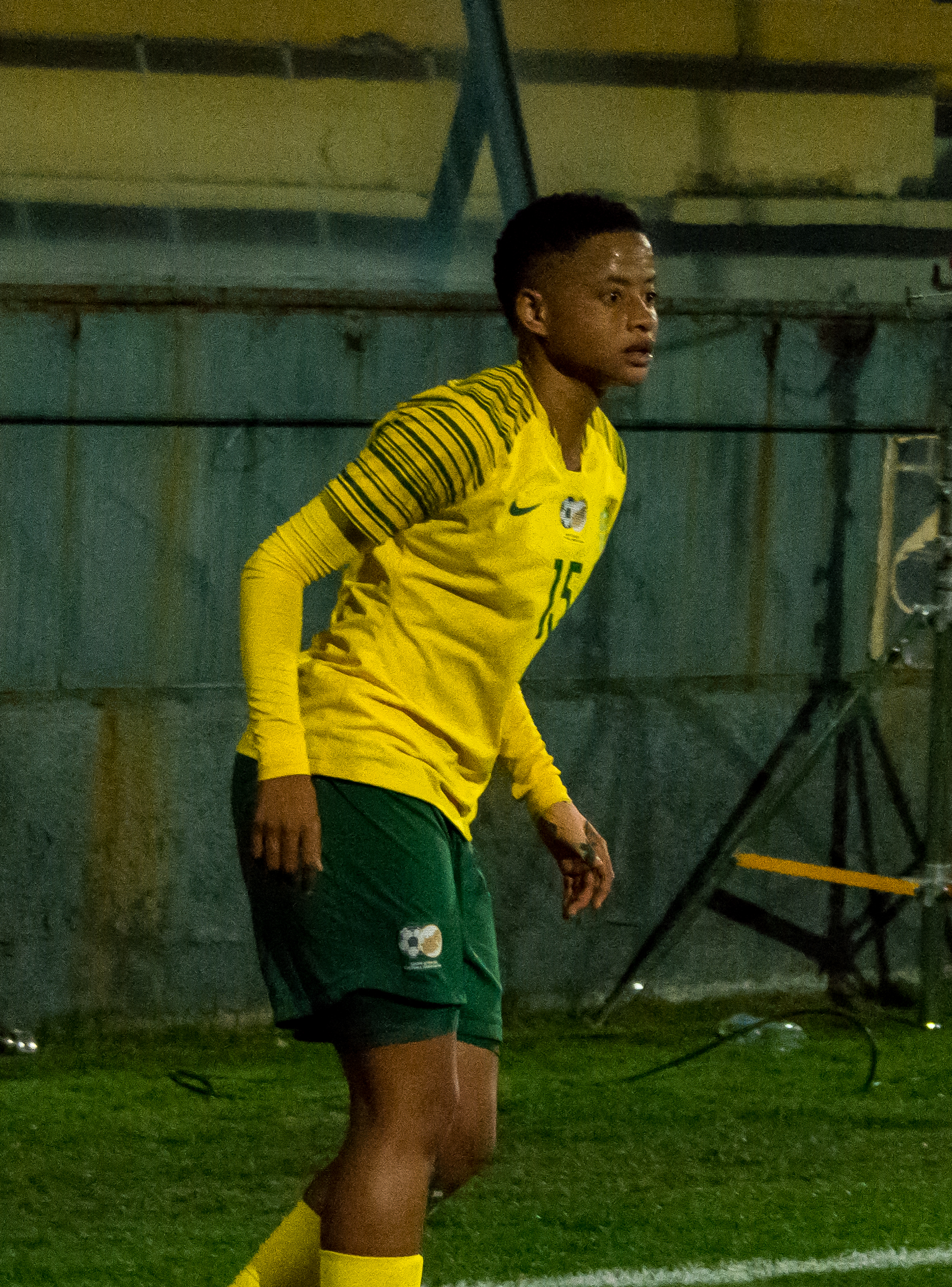 Refiloe Jane, Chile v Sudáfrica, Estadio Santa Laura, Independencia, Santiago, Chile.